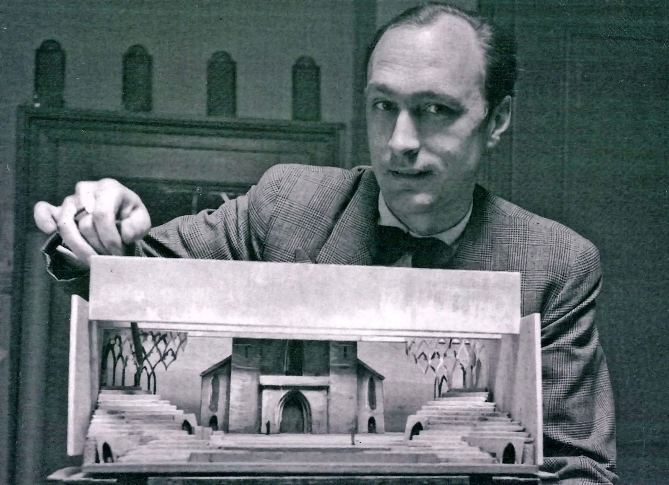 André Perrottet bei der Arbeit